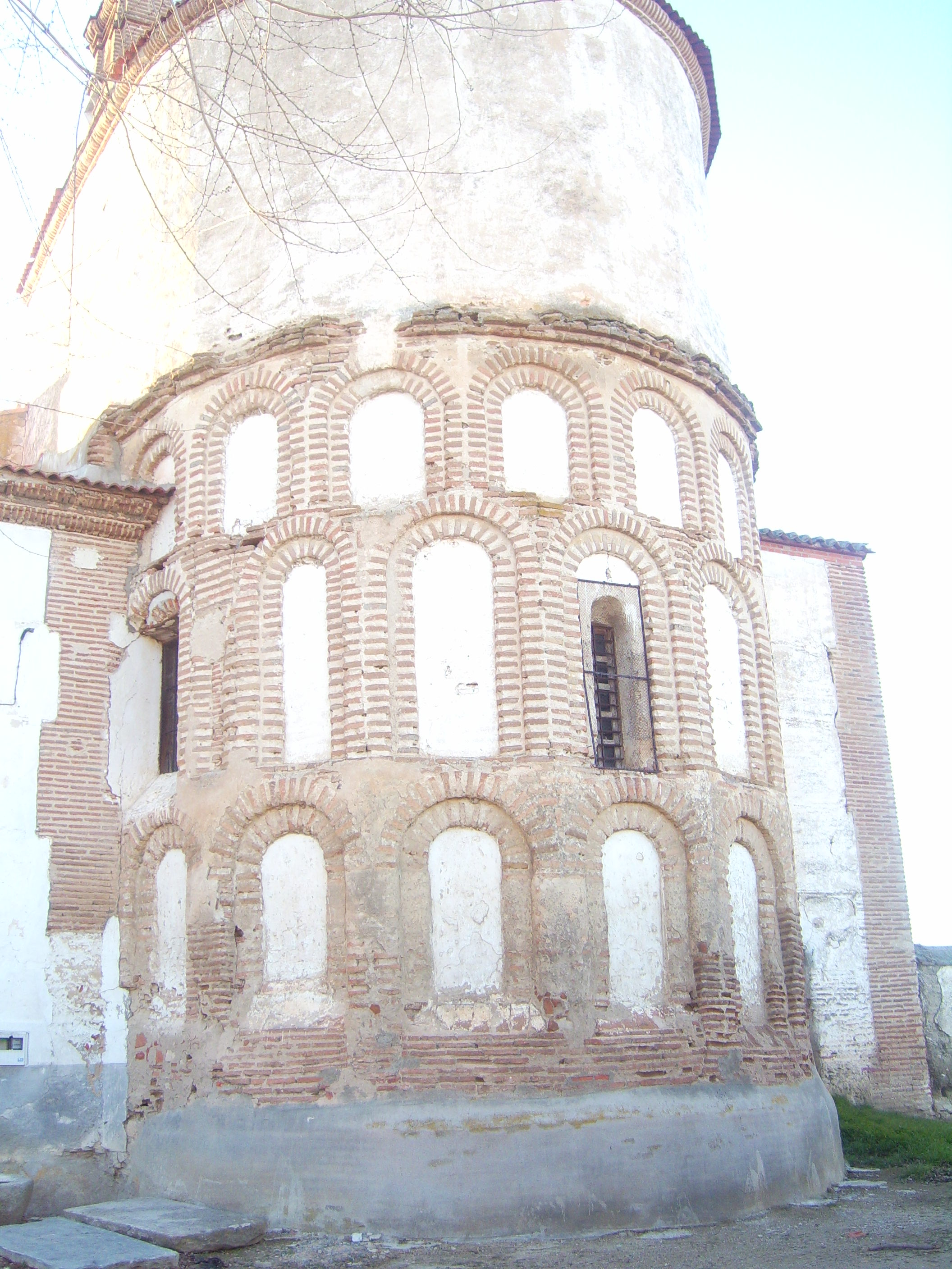 Ábside de la Iglesia de San Miguel Arcángel de Cantiveros (Ávila)